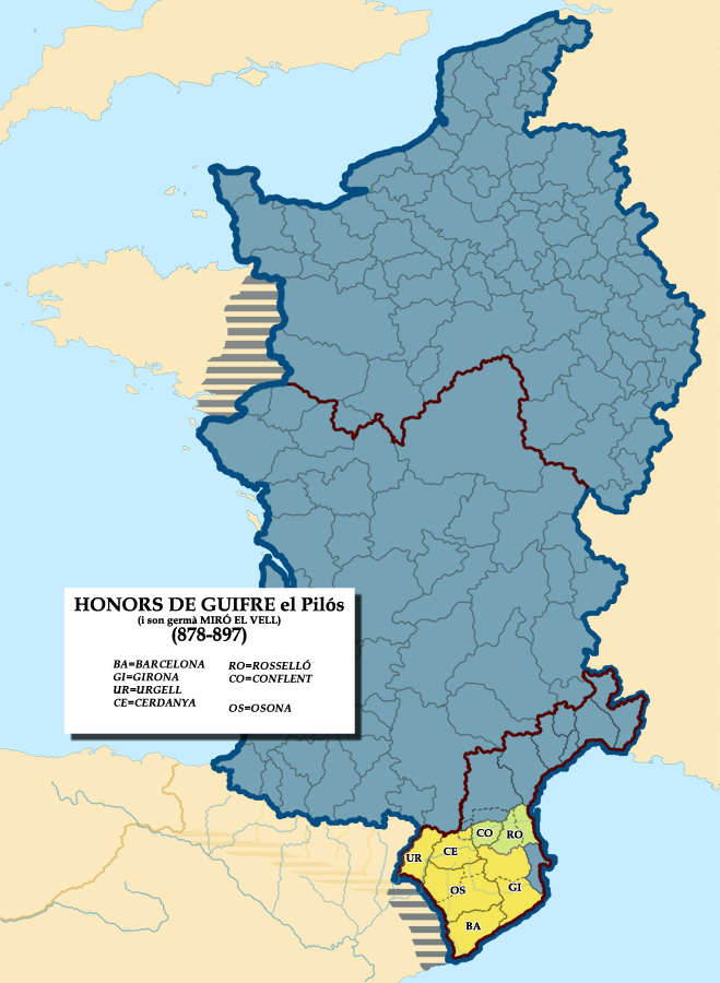 Mapa dels honors de Guifré el Pilós (878-897) i son germà Miró el Vell